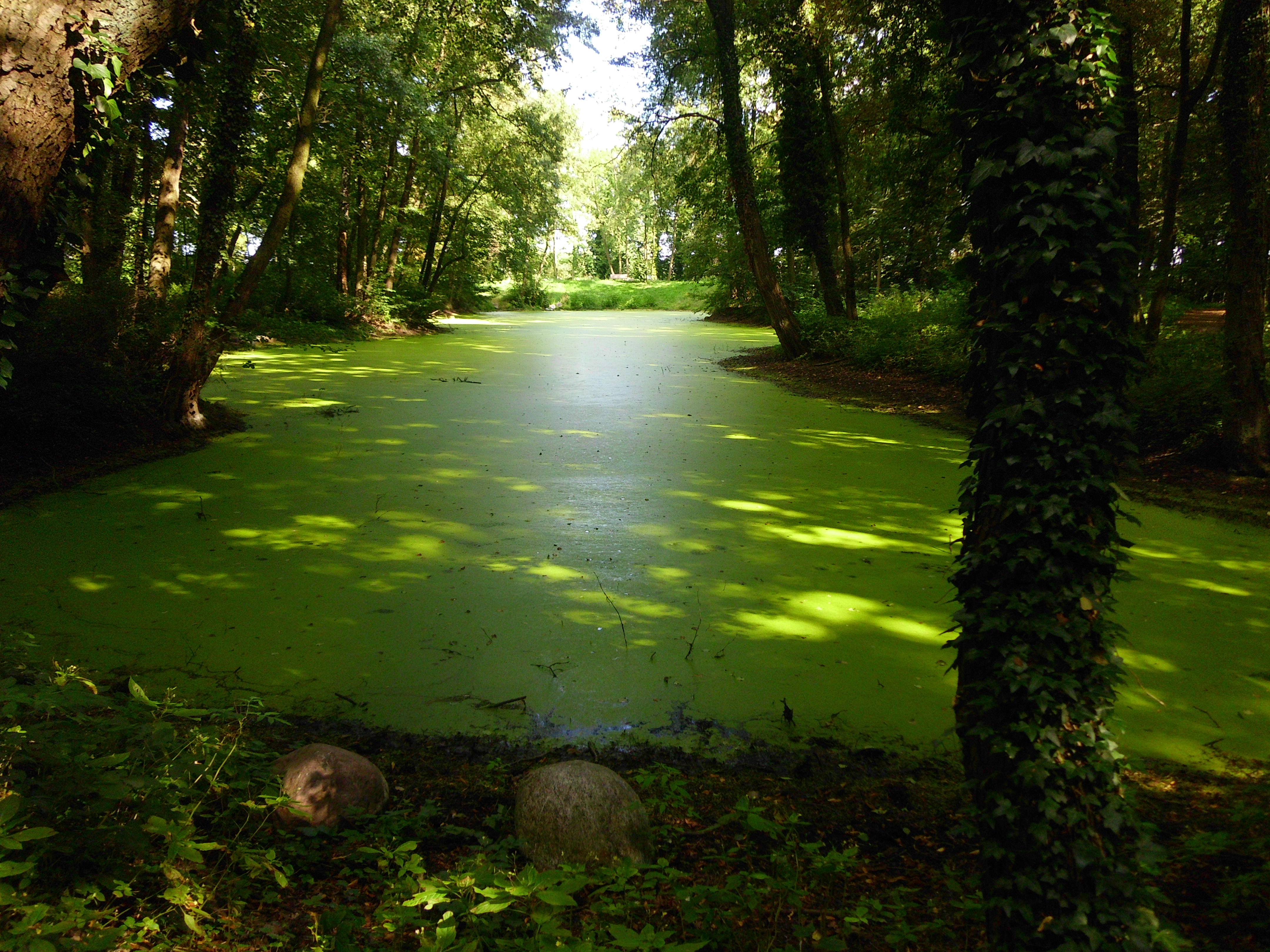 Teich im Gutspark Dahlewitz